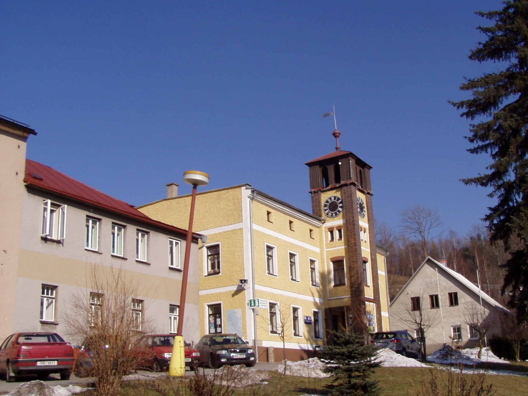 Olešnice v Orl. horách - náměstí s obecním úřadem